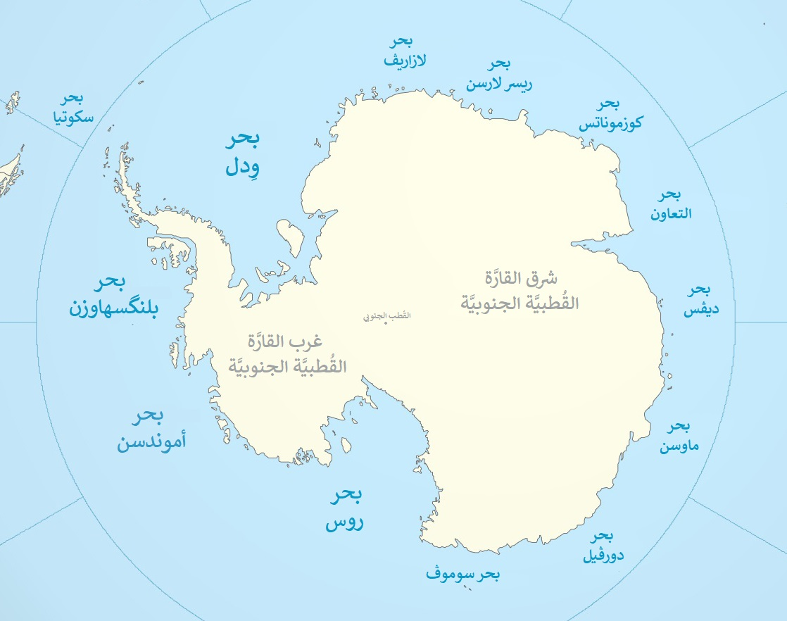 بحار المُحيط الجنوبي